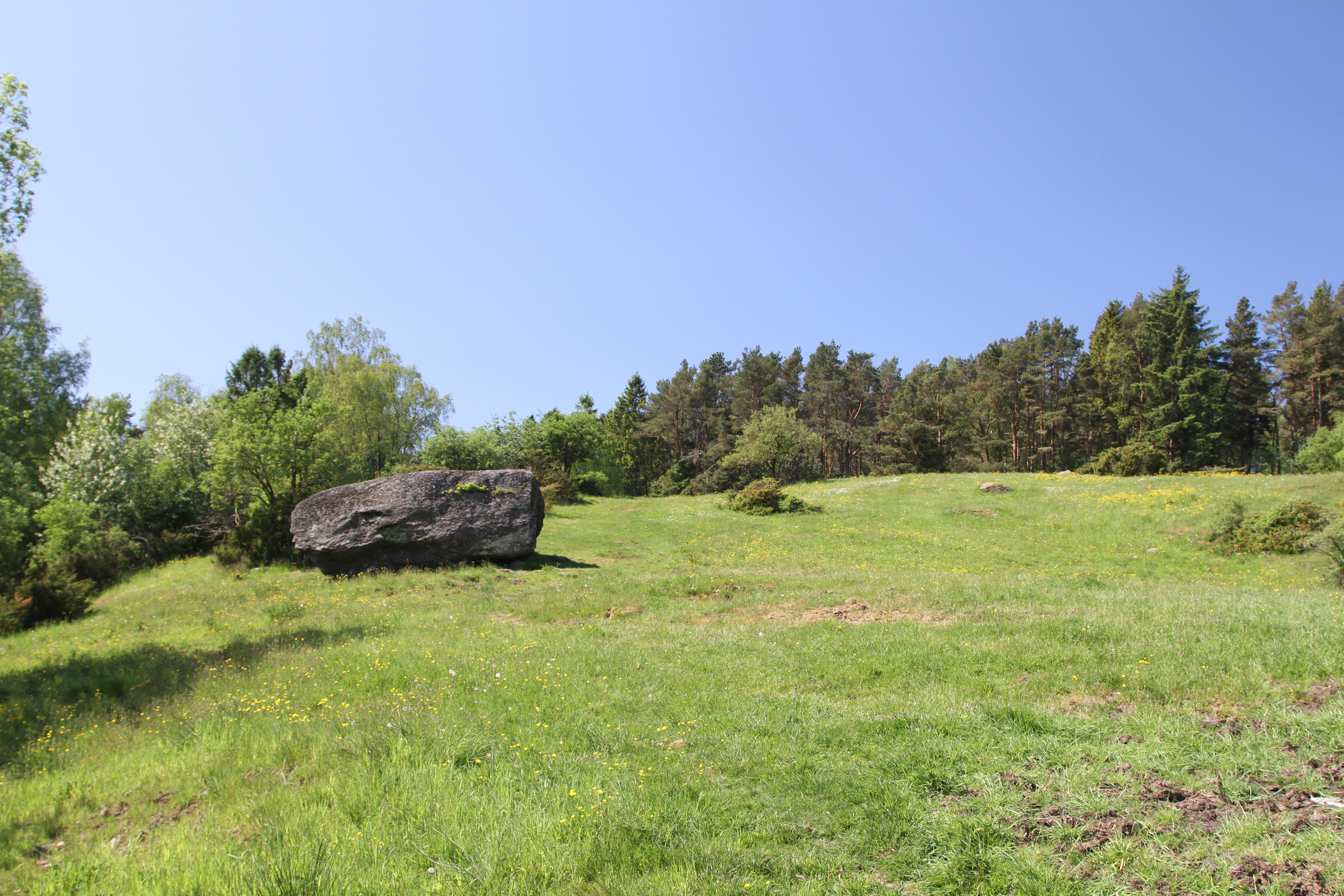 Jentesteinen, Sørmarka, Stavanger